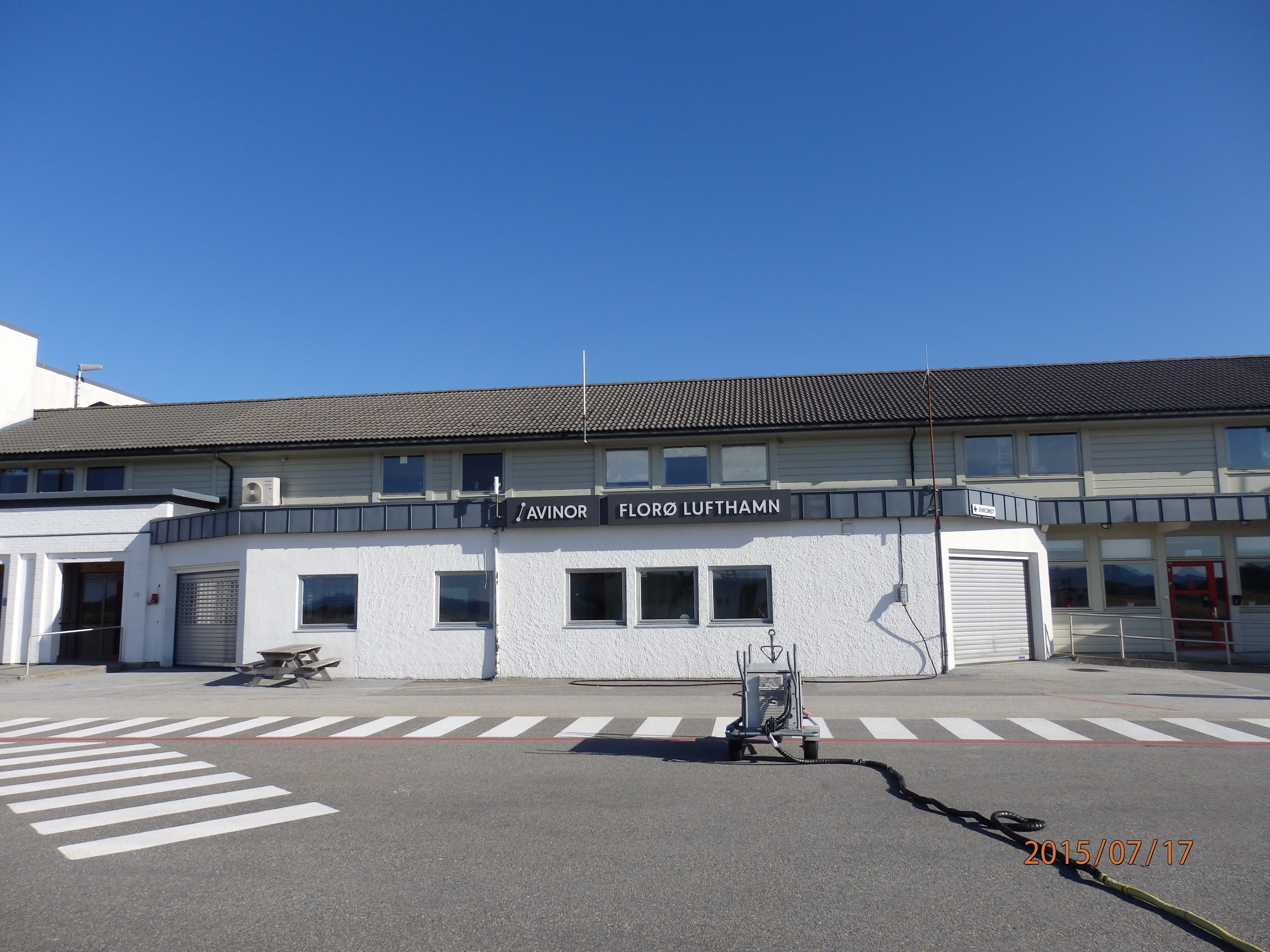 Florø lufthavn